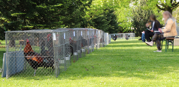 Langkraaiwedstrijd in Duitsland 2015